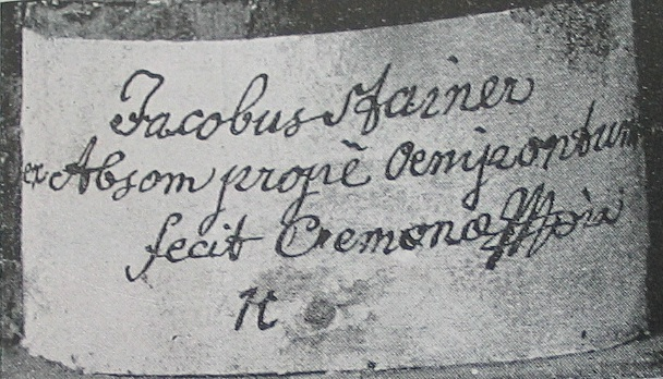 Geigenzettel von Jakob Stainer